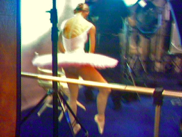 Мобилография Из Арт-проекта "Мобилография" (фотография сделанная мобильным телефоном motorola c650)